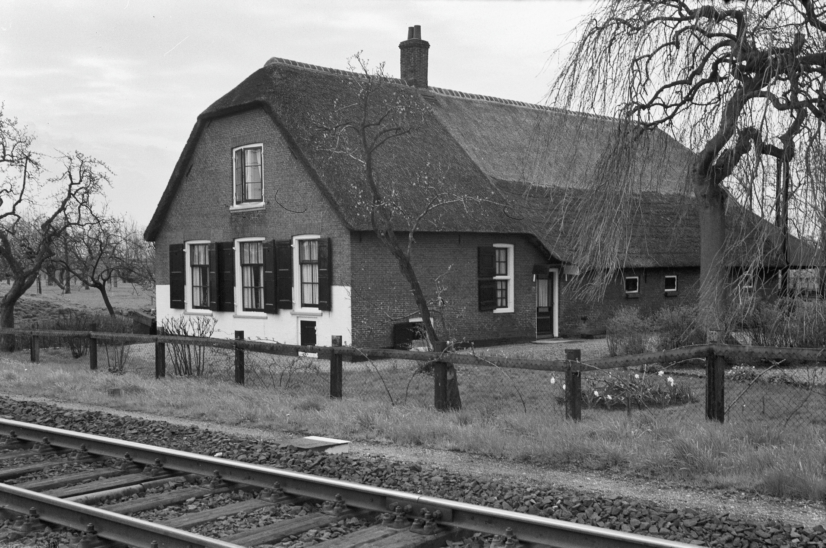 Boerderij Het Berg-je in Maarssenbroek/Maarssen: voor- en rechter zijgevel. Was gelegen langs het spoor tussen het NS-station Maarssen en de Maarsserbrug (Hoge Brug). Tot ongeveer de jaren 1970 een boerenbedrijf, daarna fungeerde de boerderij o.a. als jongerencentrum onder diverse noemers, afgebroken omstreeks het jaar 2000.